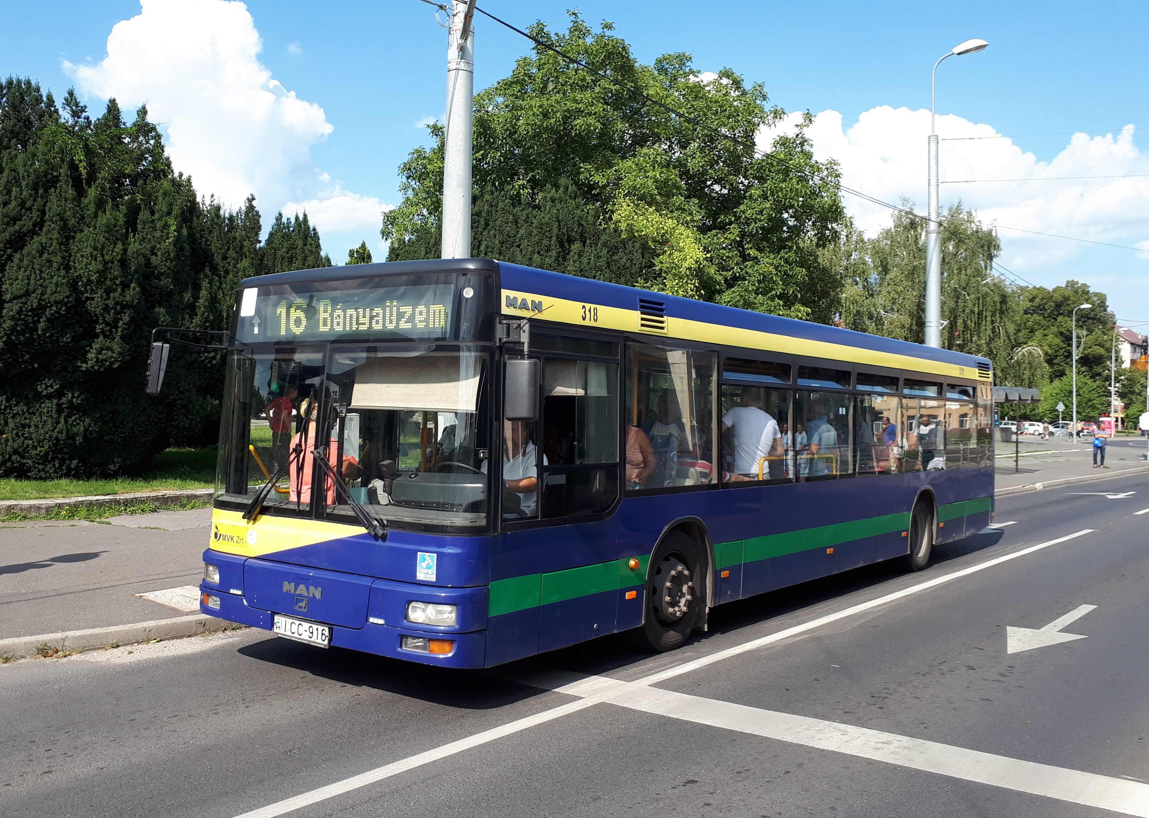 Az MVK 316-os azonosítószámú MAN NL 223 busza a 16-os busz vonalán az Újgyőri főtéren.